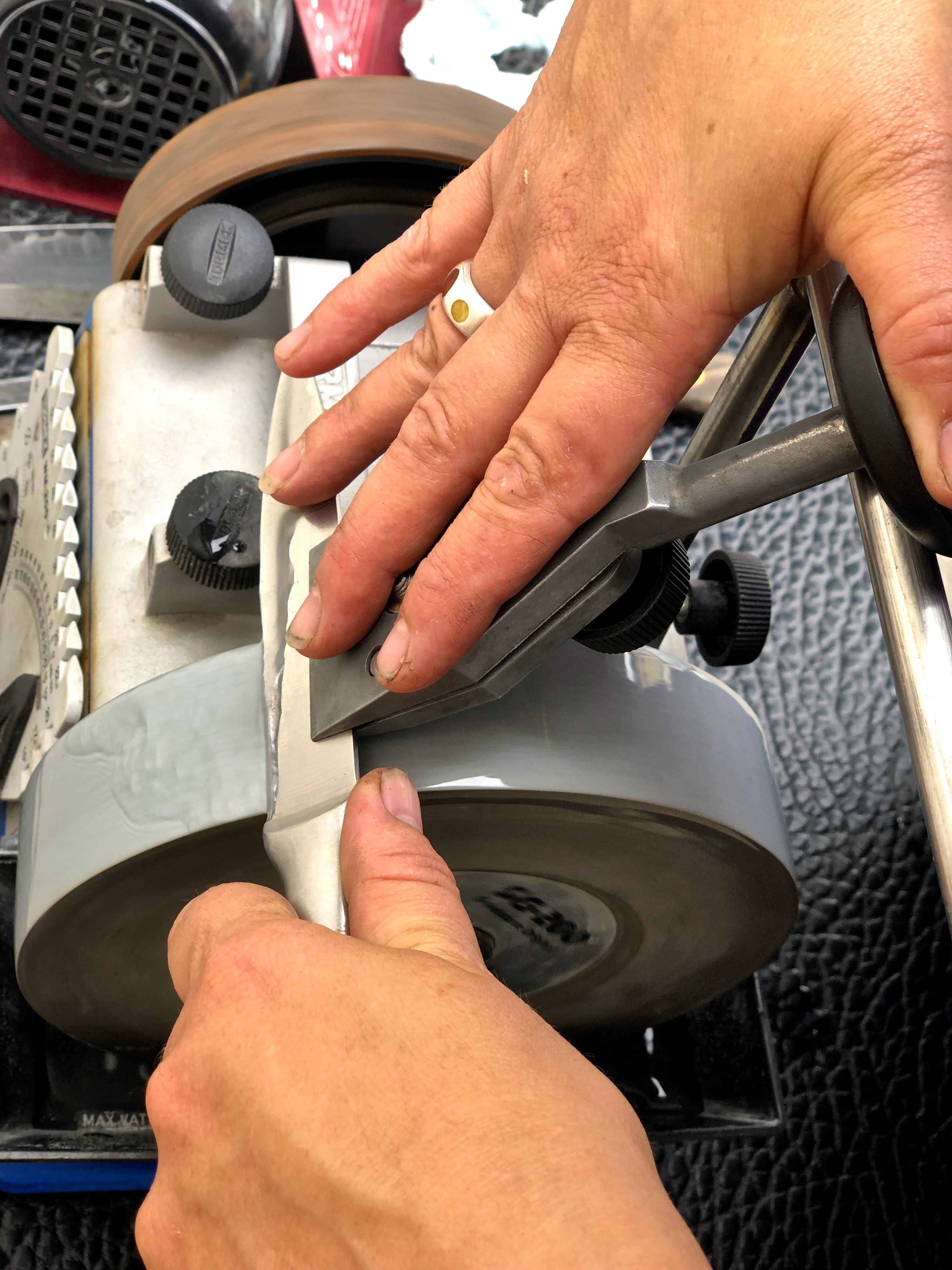 Scheren- und Messerschleiferin in Stockbridge in Hampshire, England. Hier beim Schärfen eines Kochmessers an einer mobilen Schleifmaschine, mit Hilfe eines Messerhalters und einer Handauflage an einem Schleifrad mit Wasserkühlung.